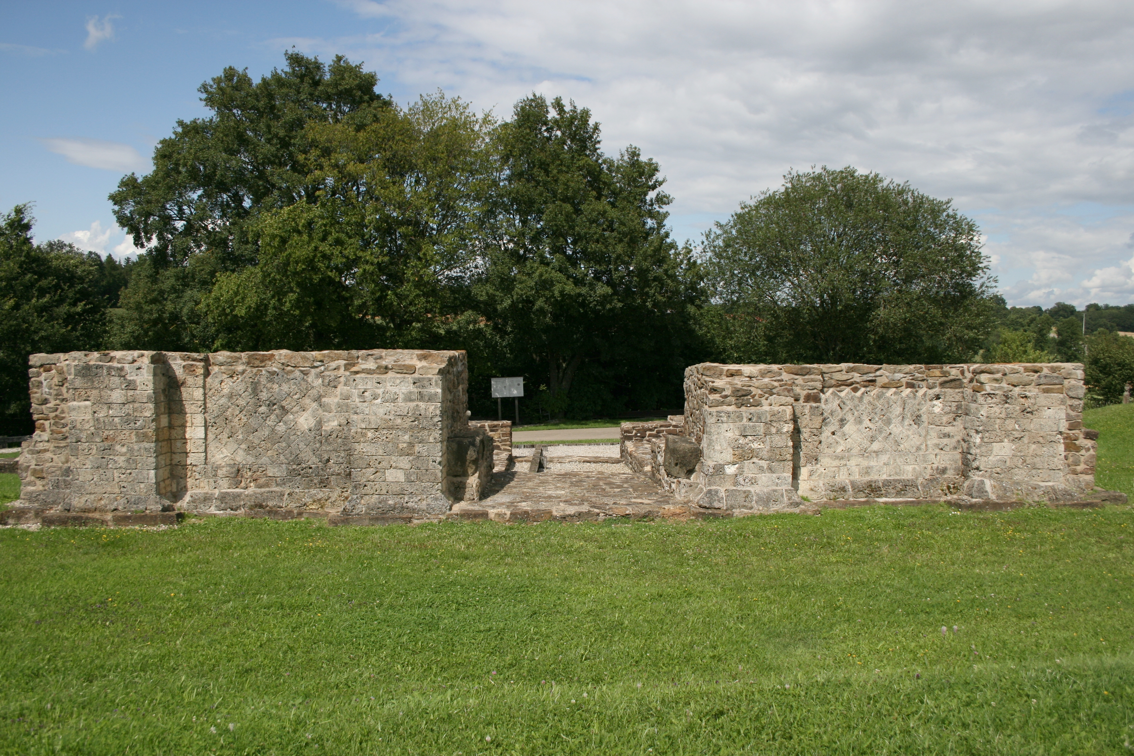 Limestor Dalkingen, Ansicht von Süden.